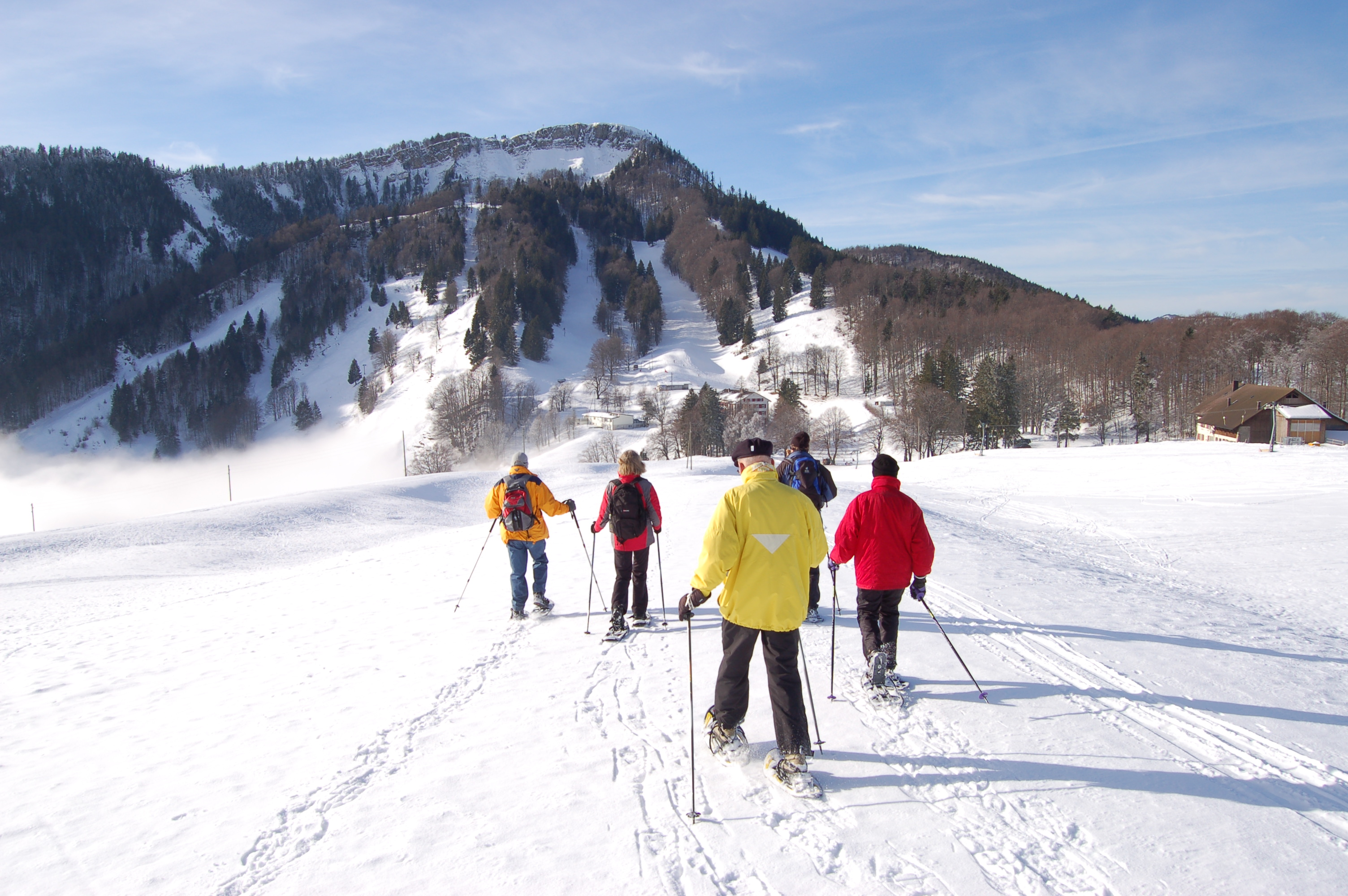 Schneeschuhkurs Balmberg mit Röti